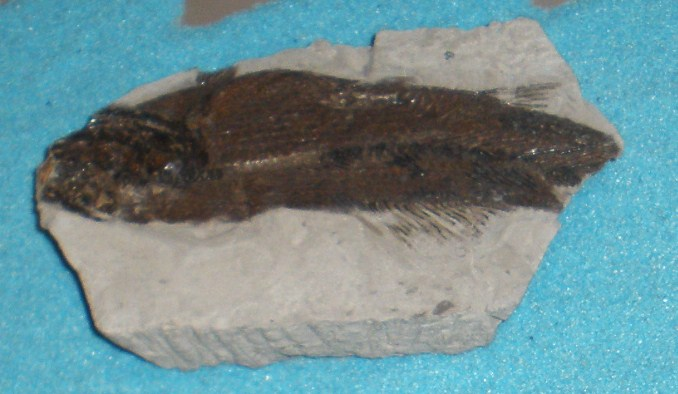 Fossil of Amiopsis, an extinct fish Took the photo at Musee d'Histoire Naturelle, Brussels